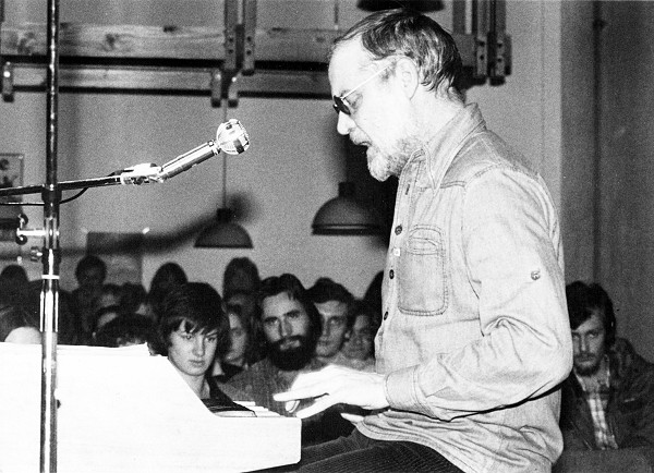 Hanns Dieter Hüsch in Aktion. Motiv: Hanns Dieter Hüsch bei einem Vortragsabend an der Universität Kaiserslautern, Mitte der 1980er-Jahre.